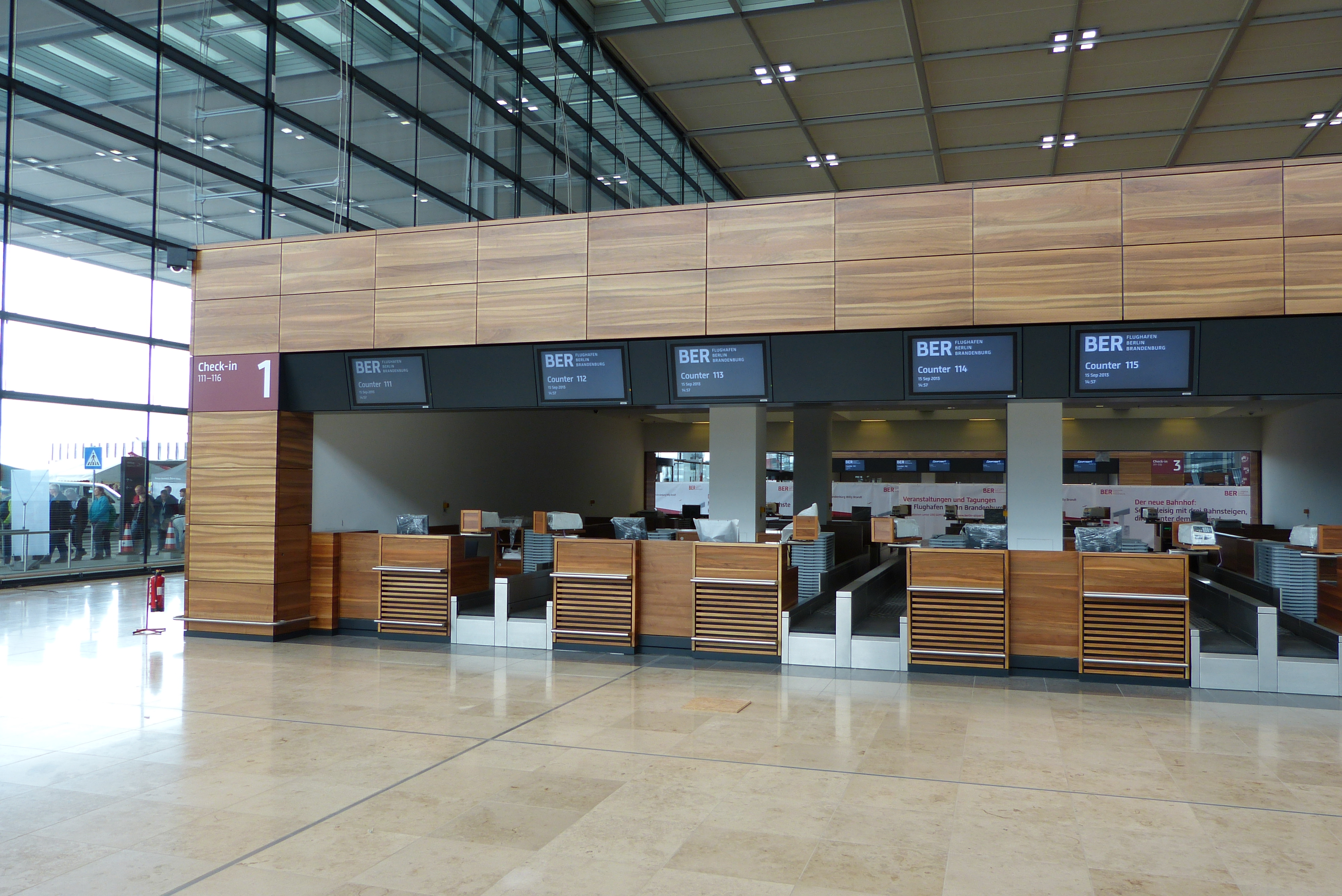 Flughafen Berlin-Brandenburg, Blick auf Check-in-Schalter